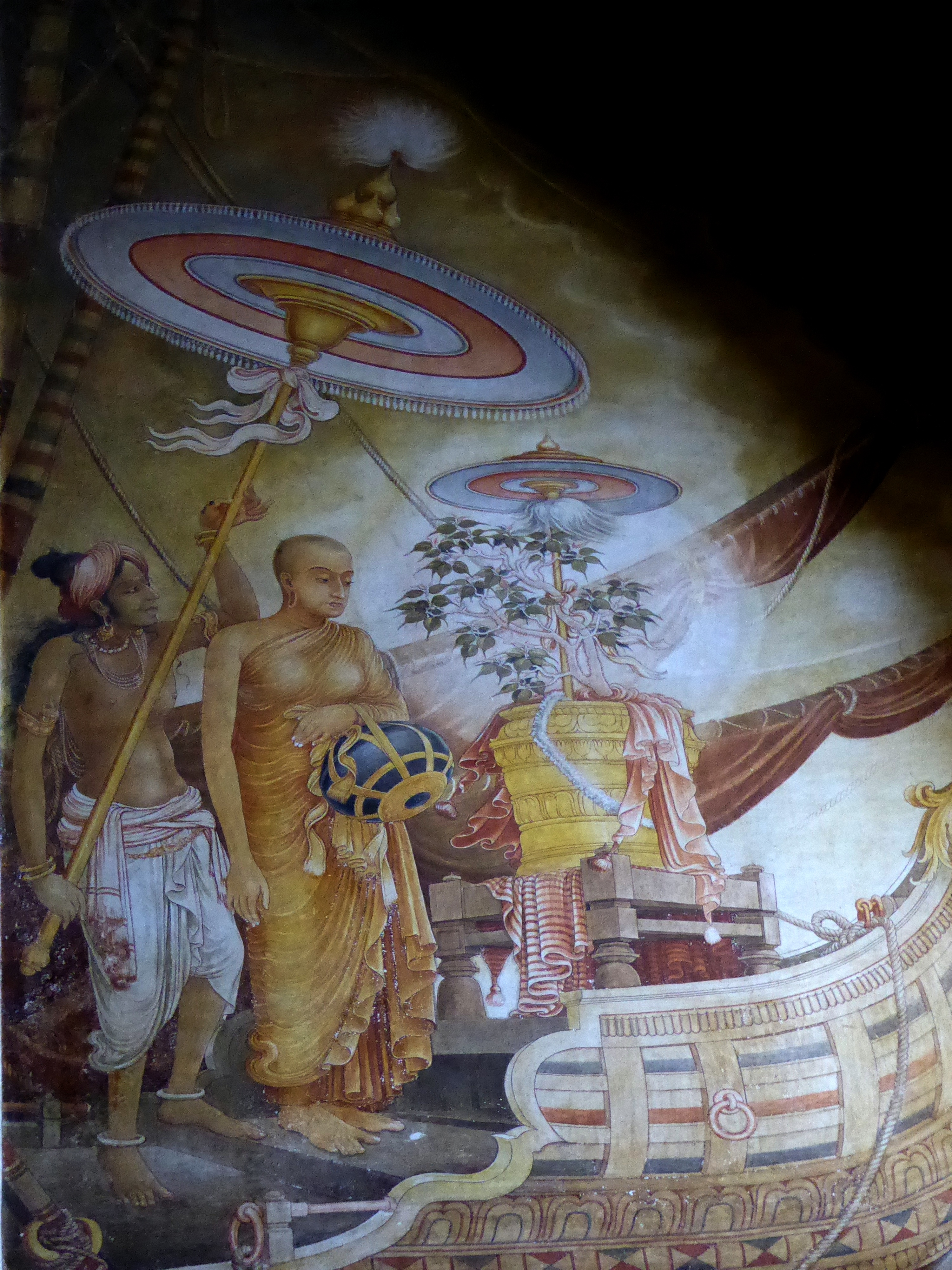 116 Sanghamitta and the Bodhi Tree, Kelaniya Raja Maha Vihara